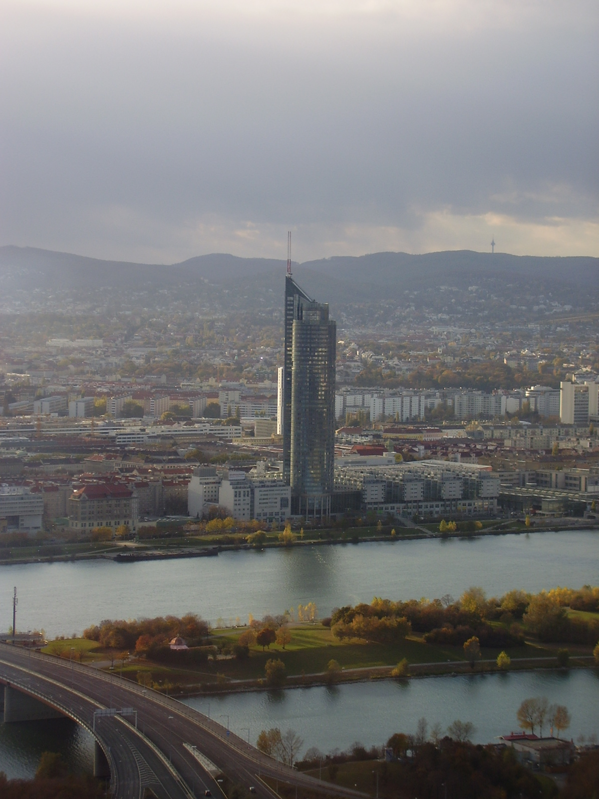 Millennium Tower, Vienna